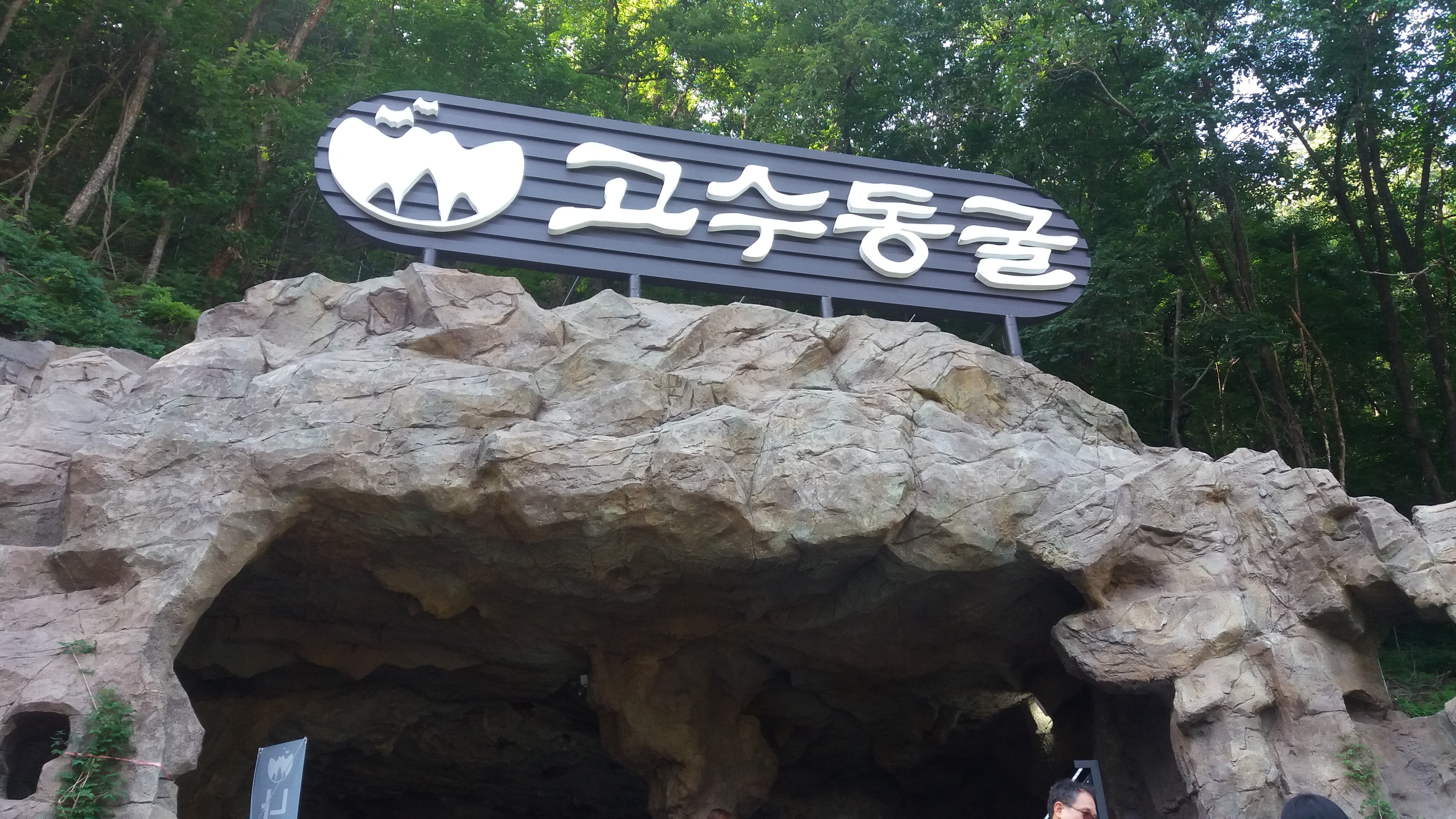 고수동굴입구